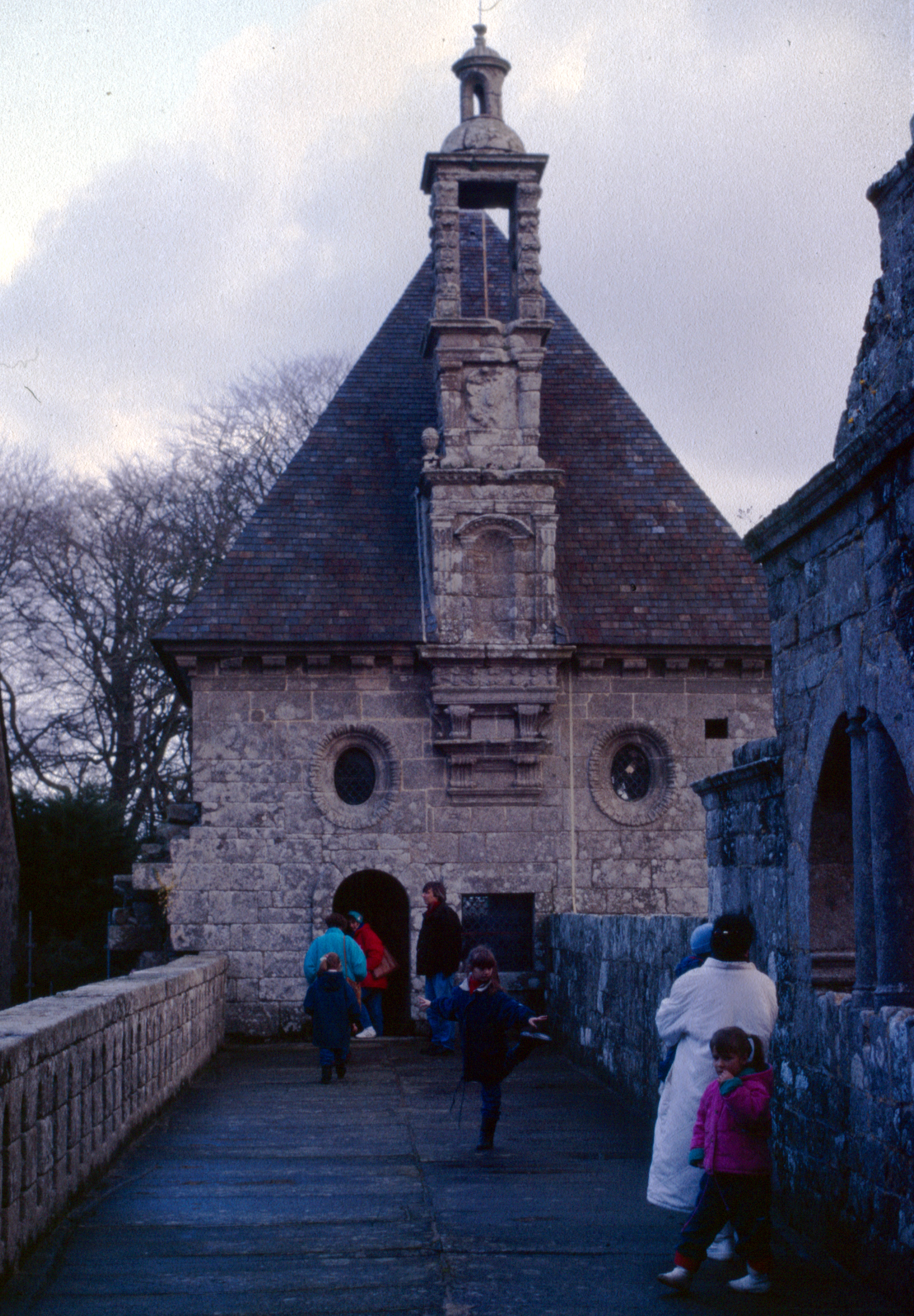 Château de Kerjean